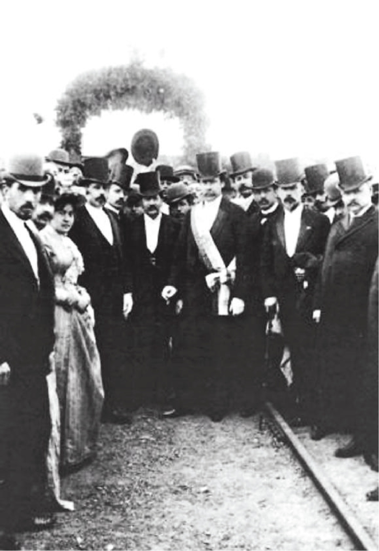 Inauguración del Viaducto del Malleco en 1890 por el Presidente José Manuel Balmaceda.